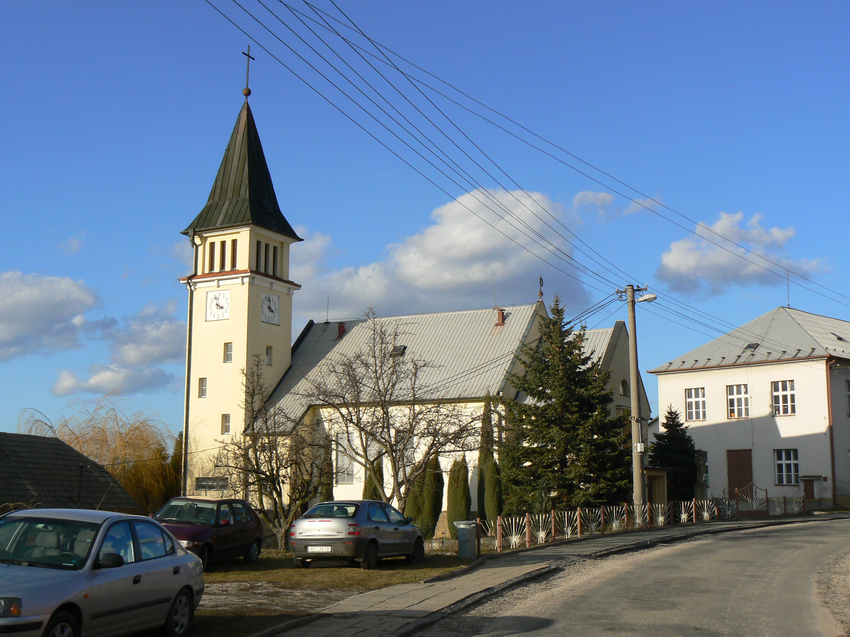 Česky: Tučapy, okres Uherské Hradiště - kostel sv. Cyrila a Metoděje.